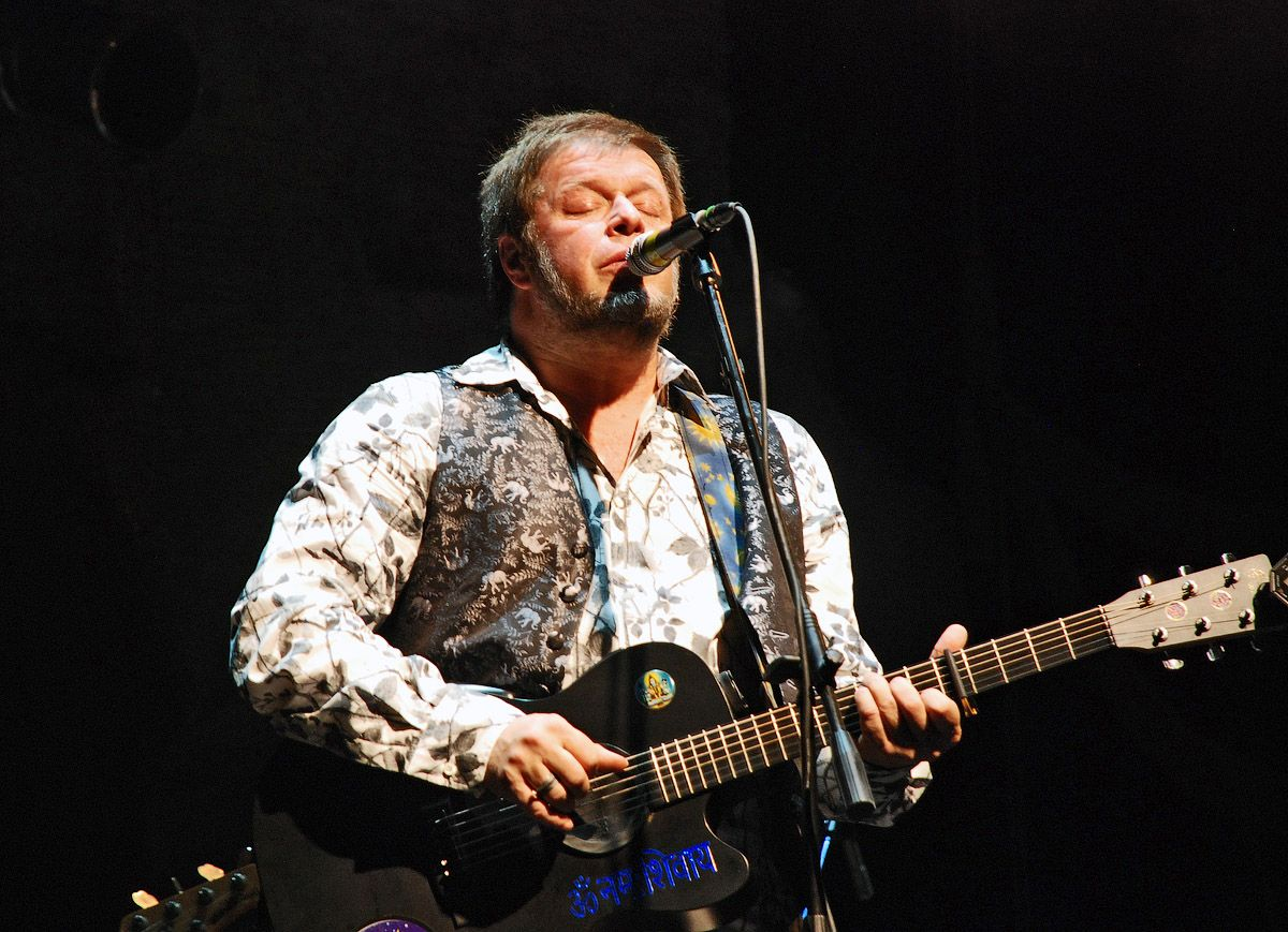 БГ на концерте в Уфе, 2009